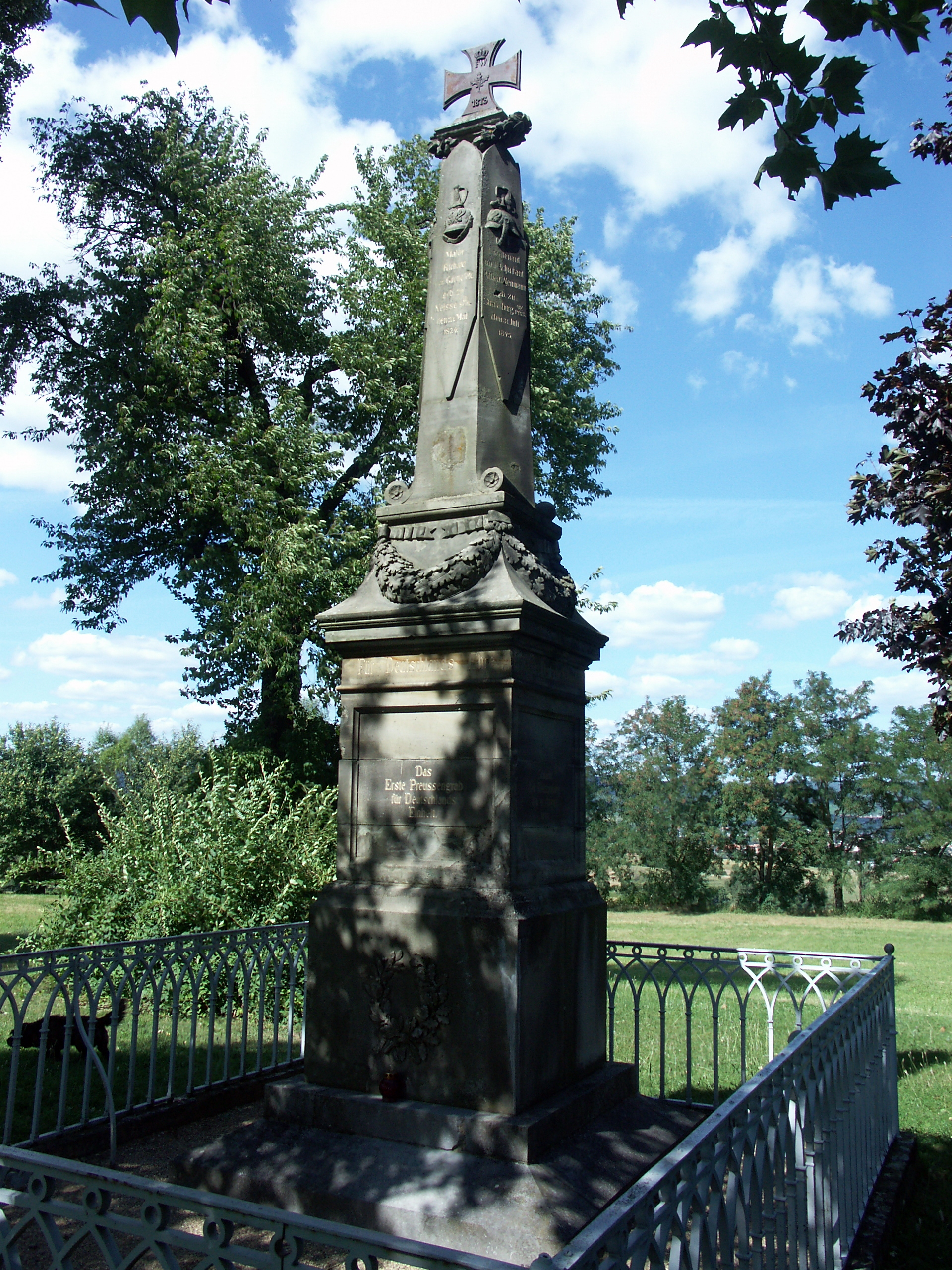 Denkmal für die im Deutsch-Französischen Krieg 1870/71 gefallenen preußischen Soldaten - Umschrift:Für Deutschlands Ehre / weiht jedes Deutsche Frauenherz / Gatten, Sohn und Bruder / gern dem Heldentode